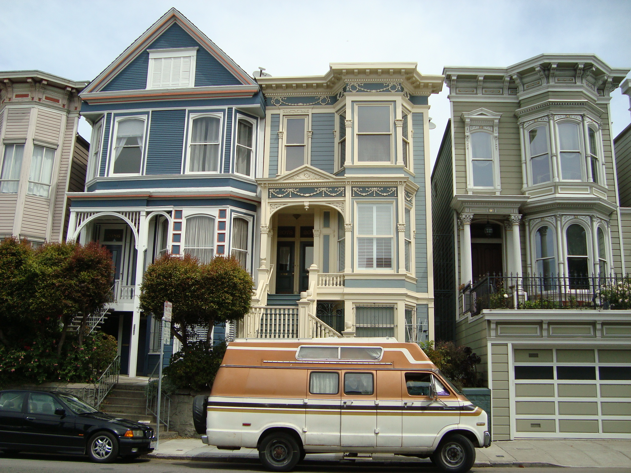 San Francisco houses